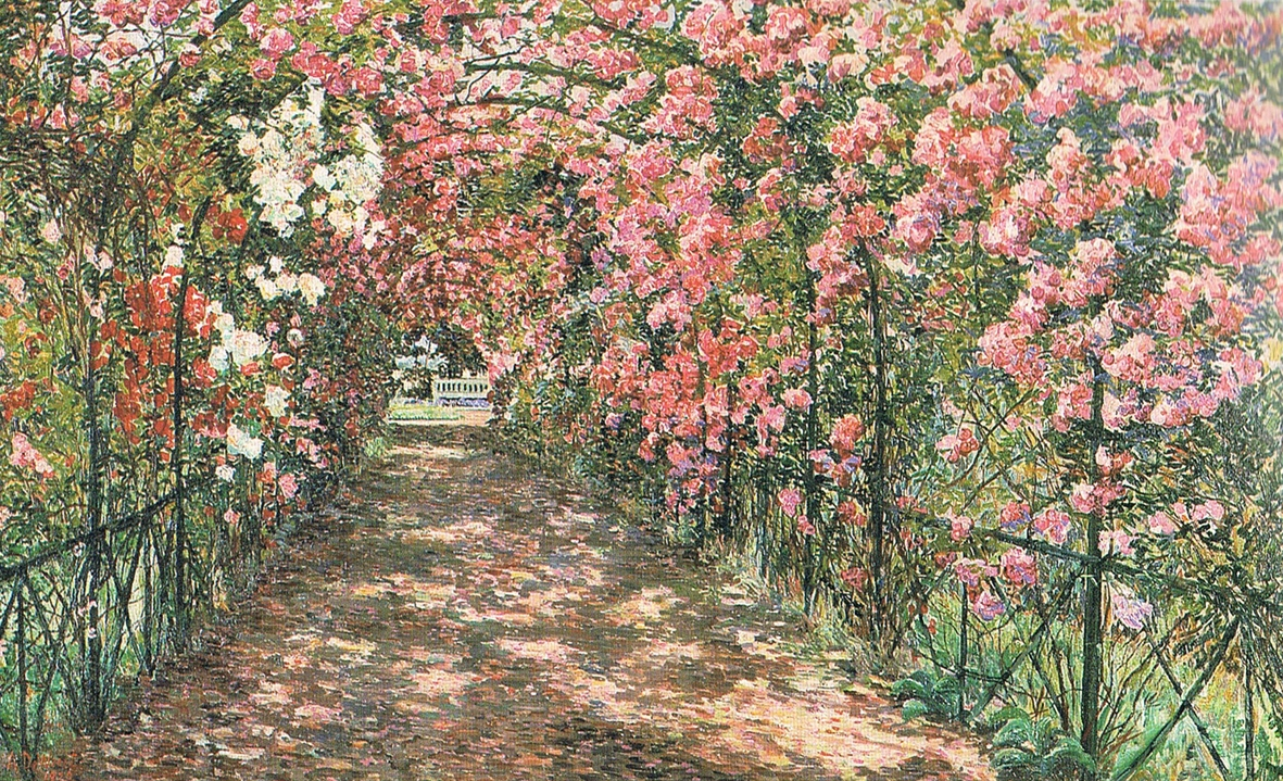 Anna De Weert (1867-1950), Tonnelle de rosiers (1920). Huile sur toile, 80 x 130 cm (Collection privée)